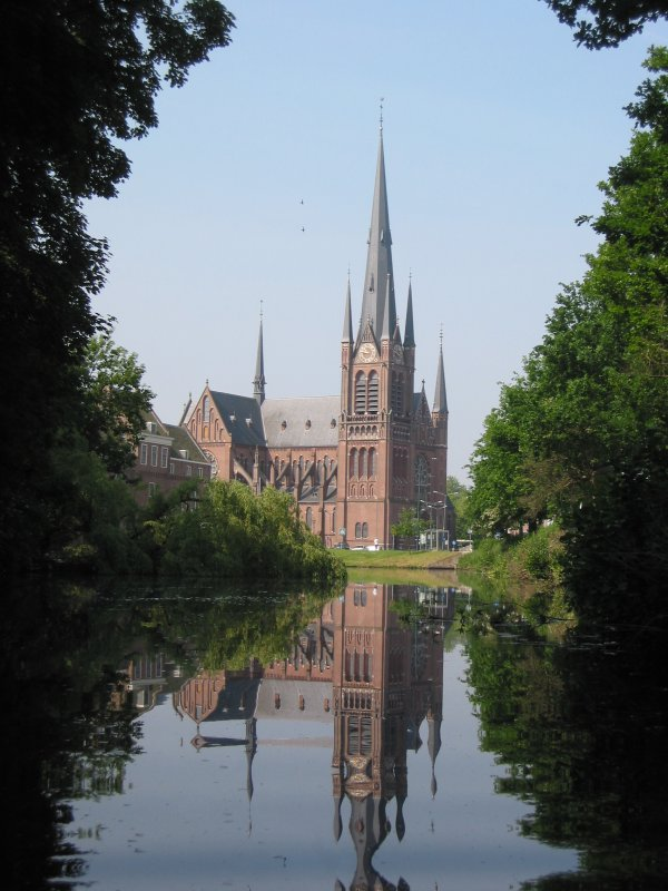 Kerk van Woerden, eigen foto Caseman 1 jun 2003